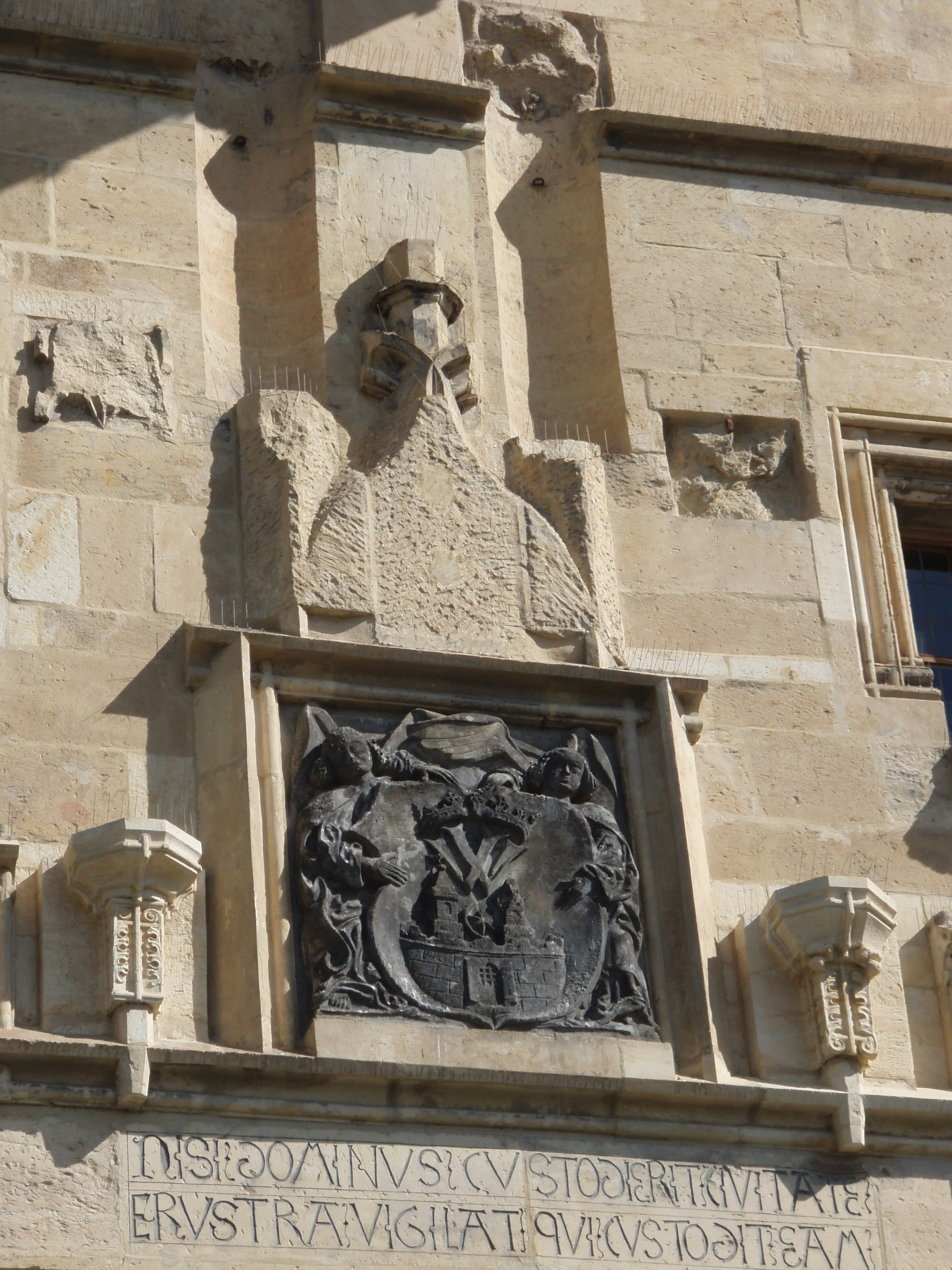 Znak města na Žatecké bráně.